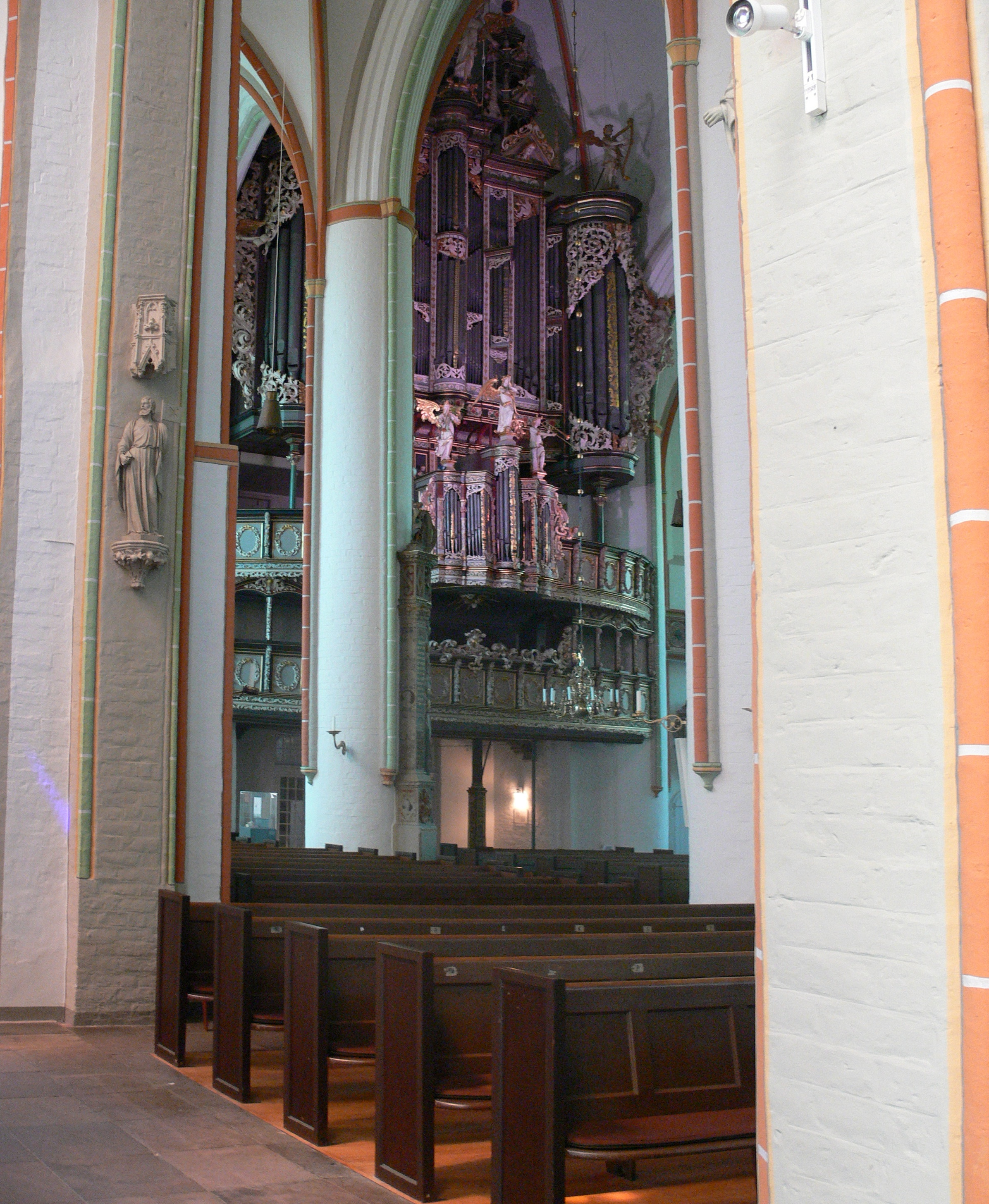 Lüneburg, Kirche St. Johannis